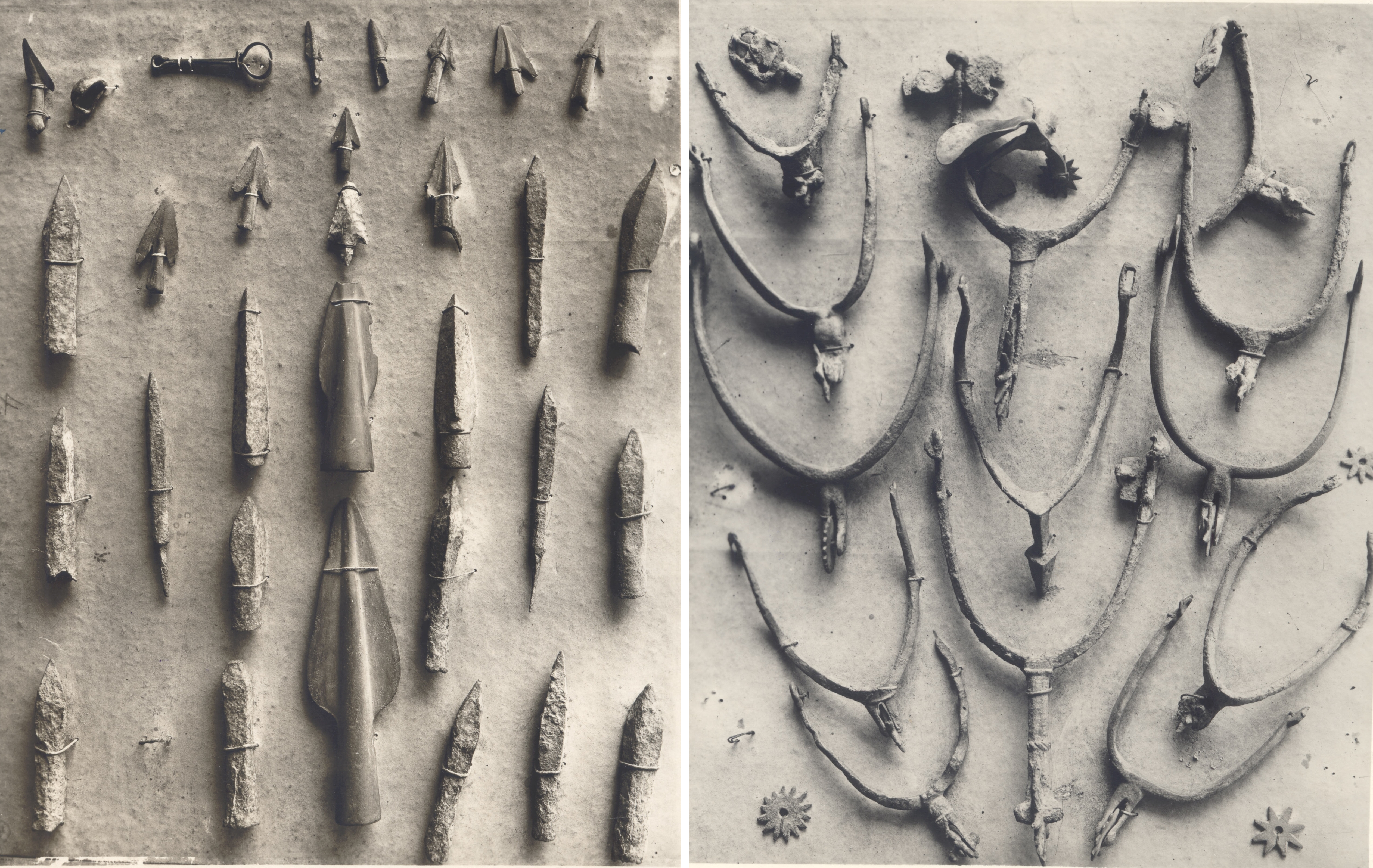 Zamek Grodziec. Zabytki archeologiczne z z epoki brązu prawdopodobnie znalezionych podczas budowy Kolei Miast Śląskich i Galicyjskich w 1887 roku na odcinku Bielsko – Cieszyn